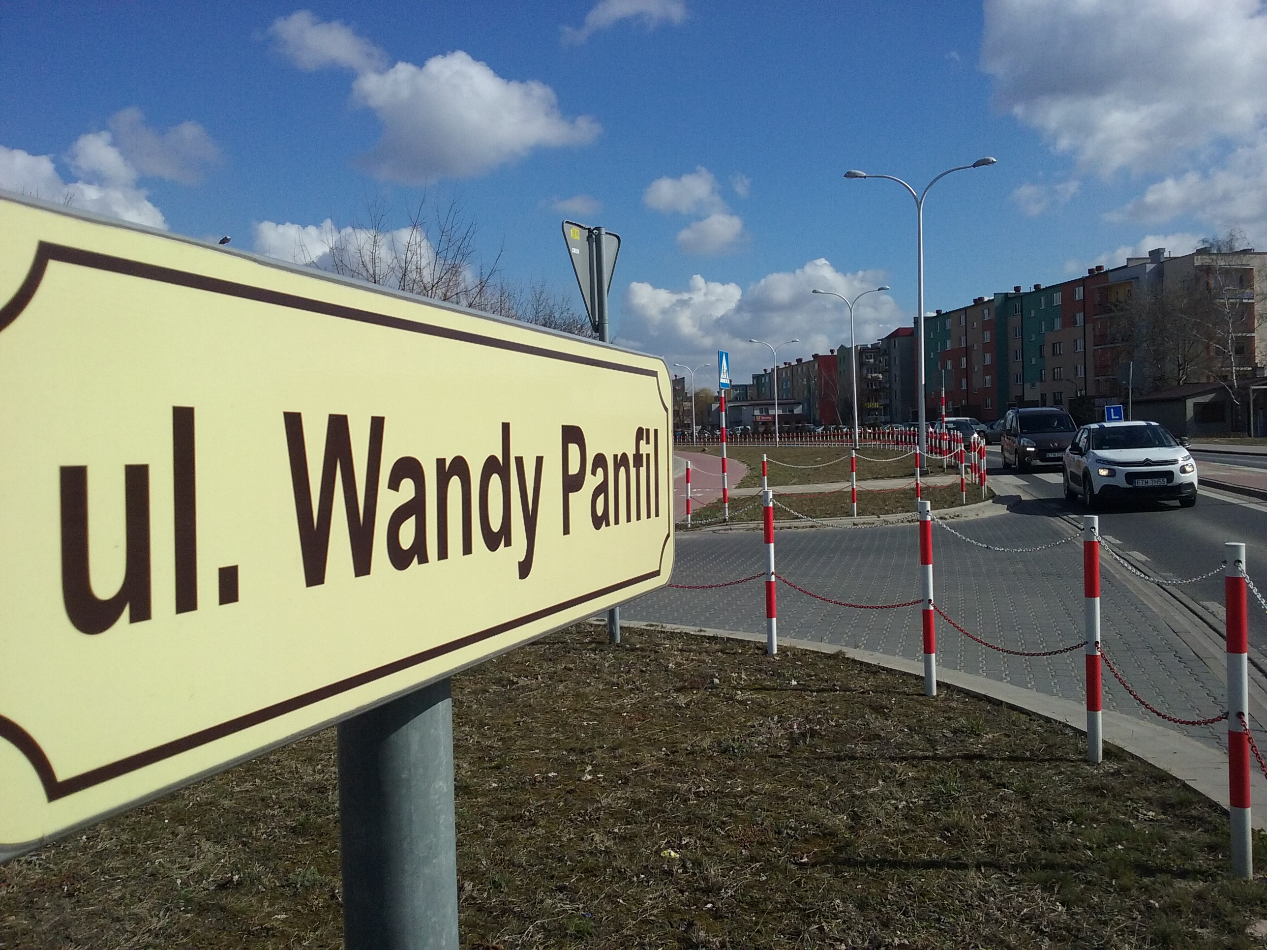 Tomaszów Mazowiecki, nowa nazwa dawnej ulicy Oskara Langego. Wybrana w toku konsultacji społecznych po ogłoszeniu przez wojewodę łódzkiego II fazy dekomunizacji.